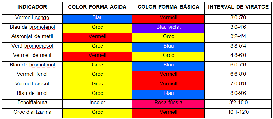 Descripció